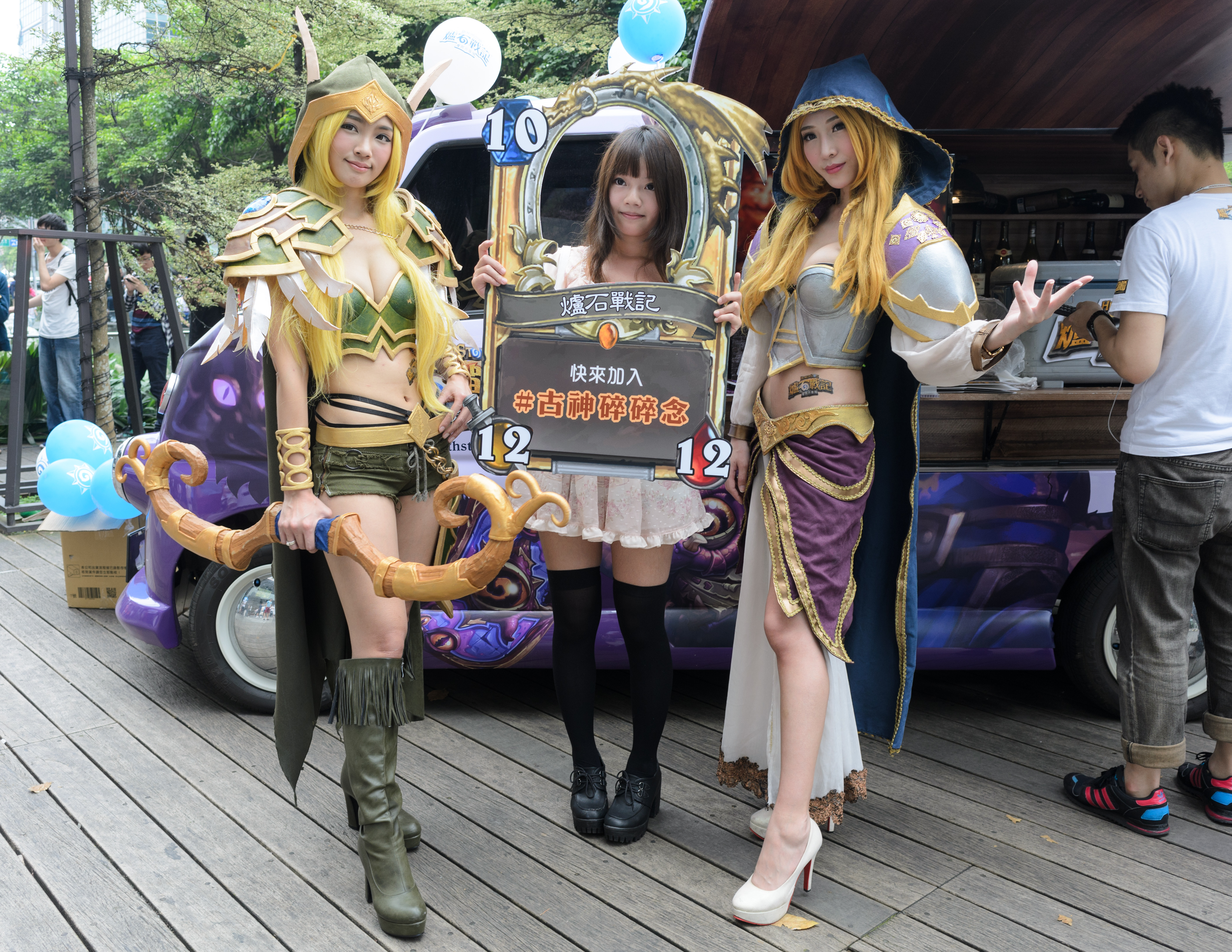 ＜爐石戰記＞街頭競技場活動，手持卡牌外框的女性遊客與Show Girls合影。